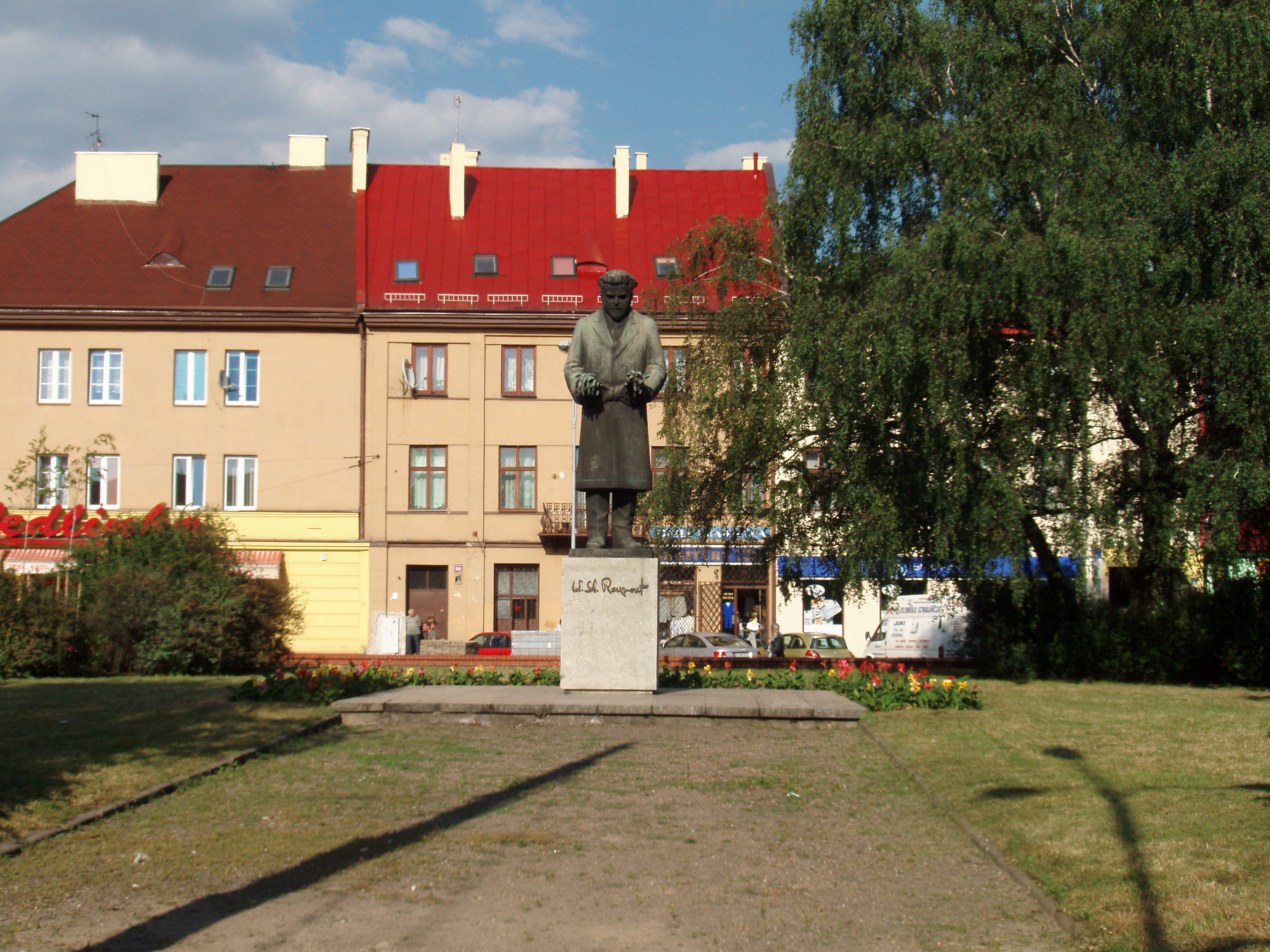 Plac Reymonta, widok na pomnik Władysława Reymonta od ul. Piotrkowskiej